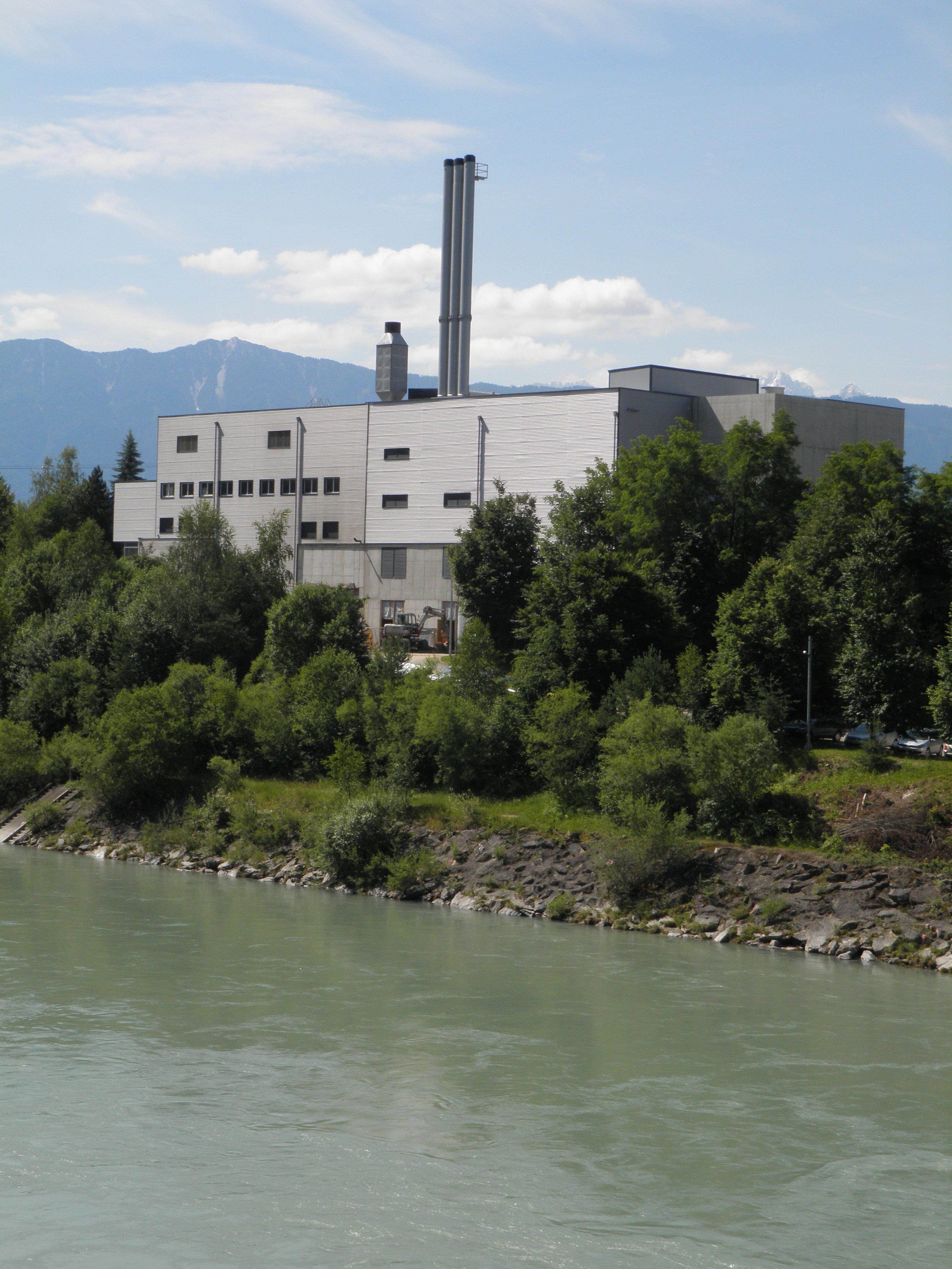 In Villach (Österreich) errichtete Holzvergasungsanlage mit 15,5 MW Brennstoffwärmeleistung